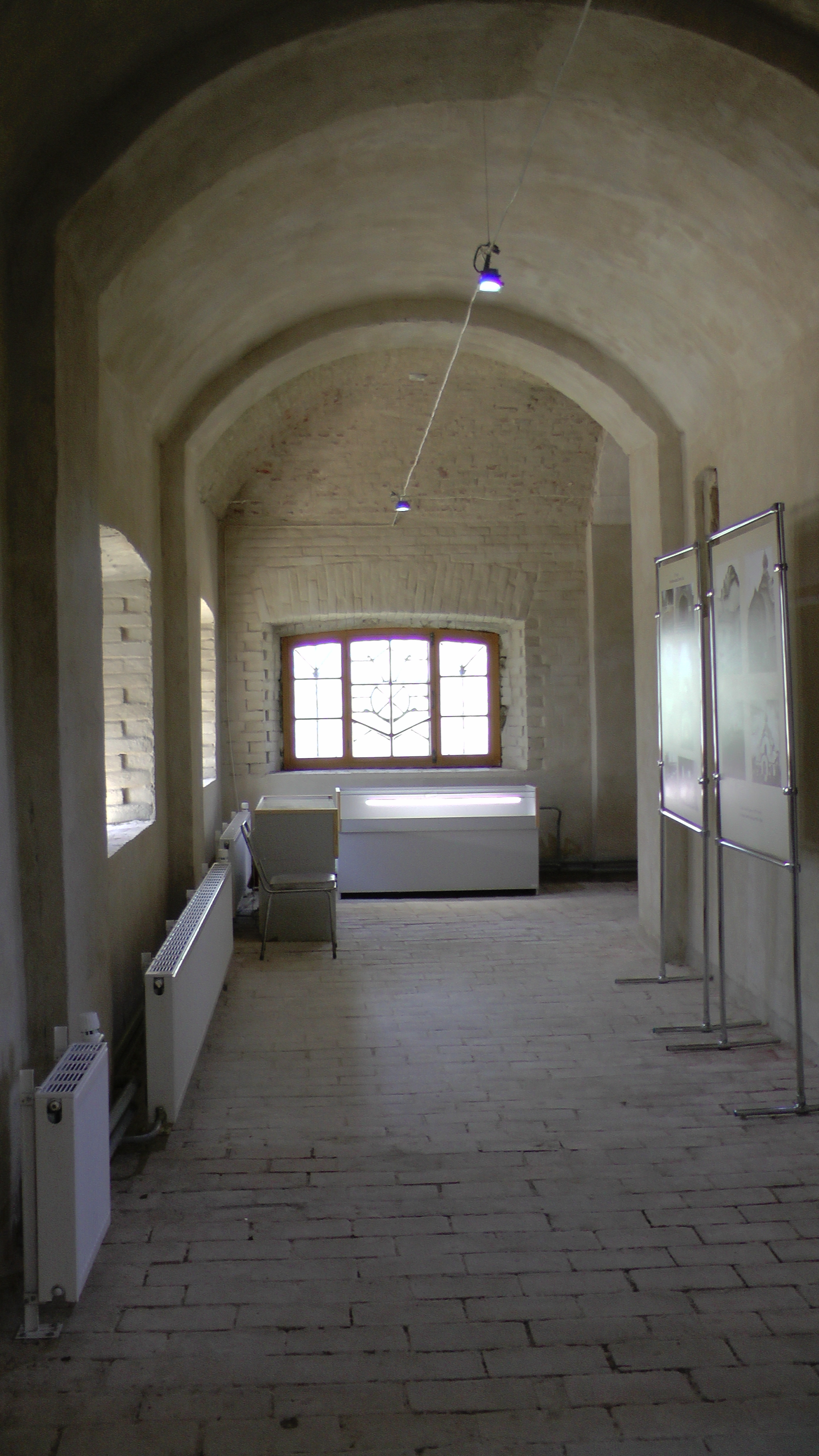 Храм Святого Духа (Талашкино). Интерьер